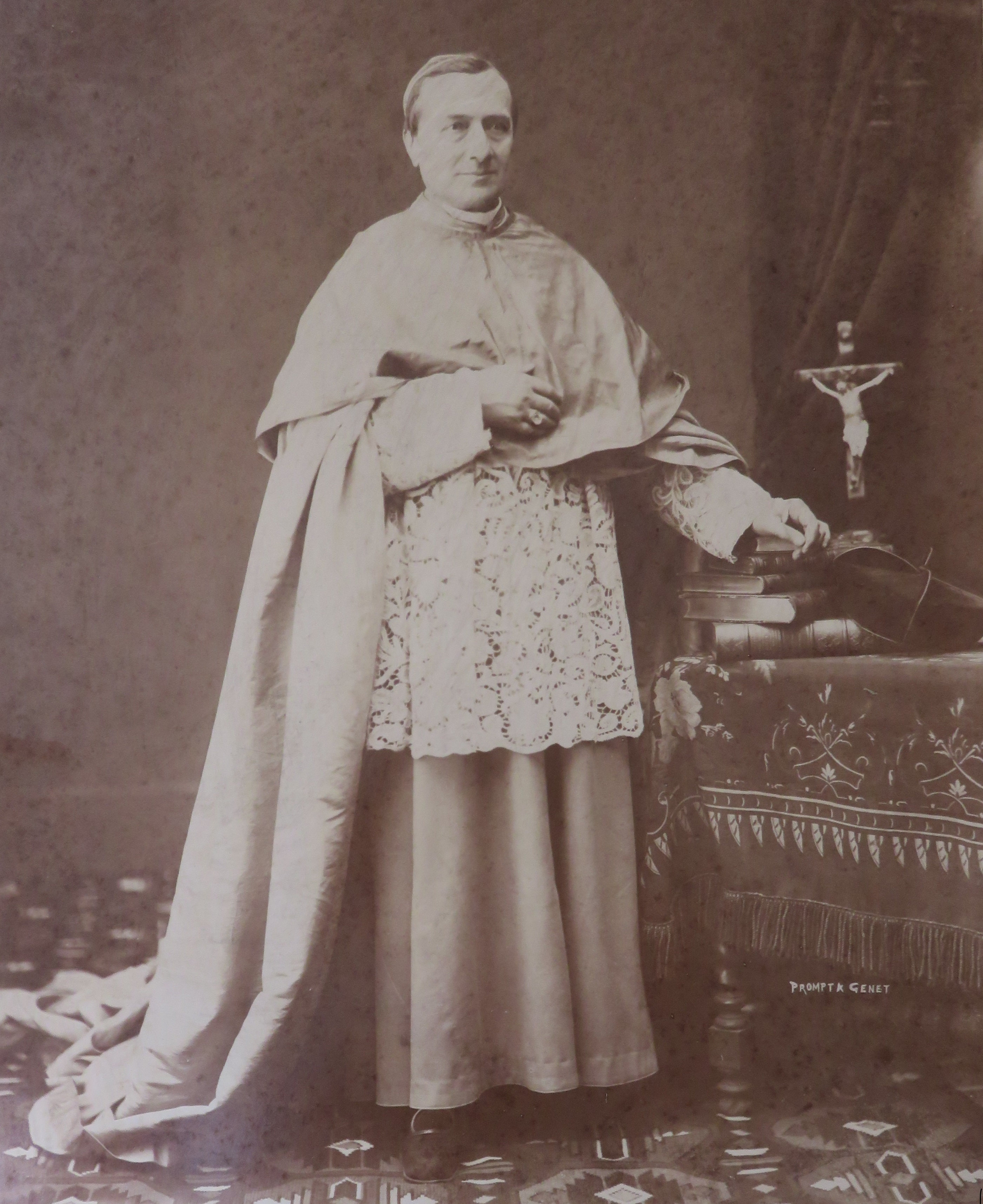 Archevêché ALBI